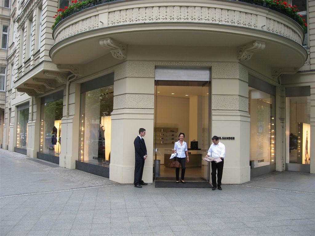 Foto tomada en belin